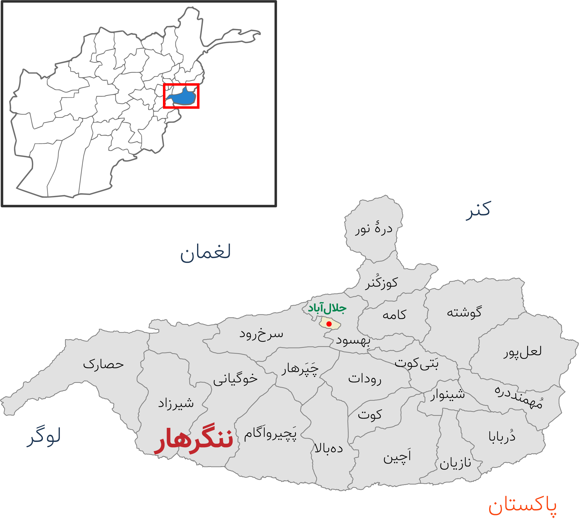 نقشه ولایت ننگرهار